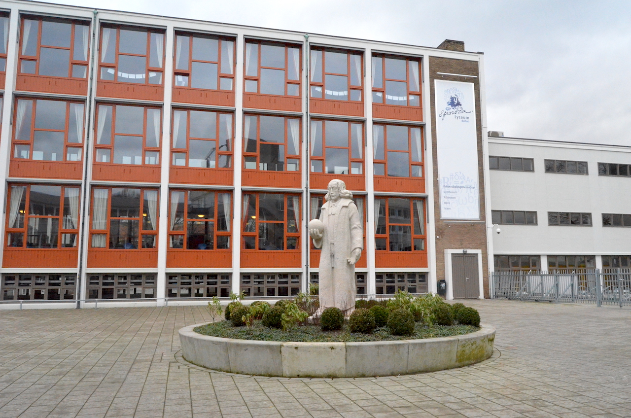 Beeld van Spinoza voor het Spinoza Lyceum aan de Peter van Anrooystraat. Foto: Erik Swierstra.